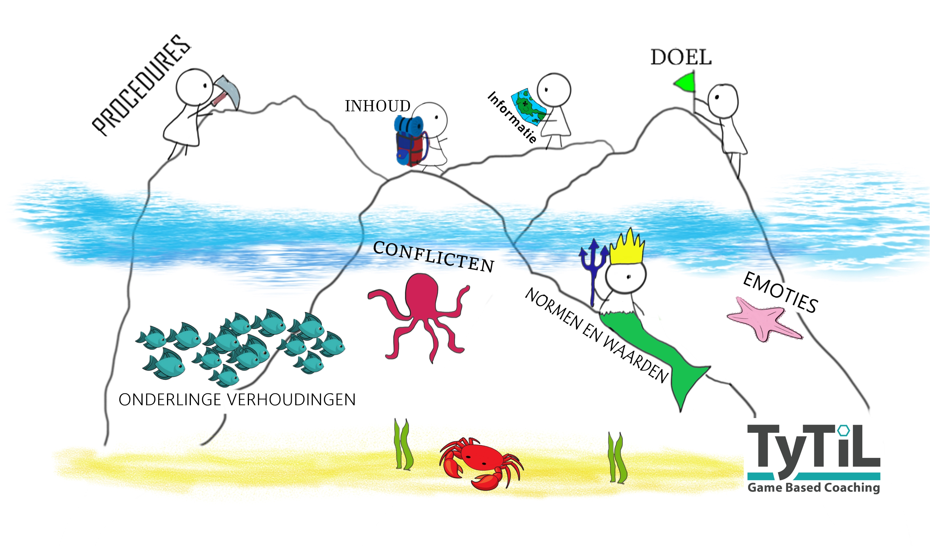 Wat bevindt zich boven en onder de waterspiegel